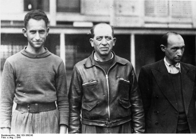 Frankreich, Konzentrationslager Drancy Zentralbild: II Weltkrieg 1939-45 Nach der Besetzung Frankreichs durch die faschistische deutsche Wehrmacht werden auch hier die nazistischen Rassengesetze angewendet. Internierte Juden im Konzentrationslager von Drancy (Frankreich),1941.